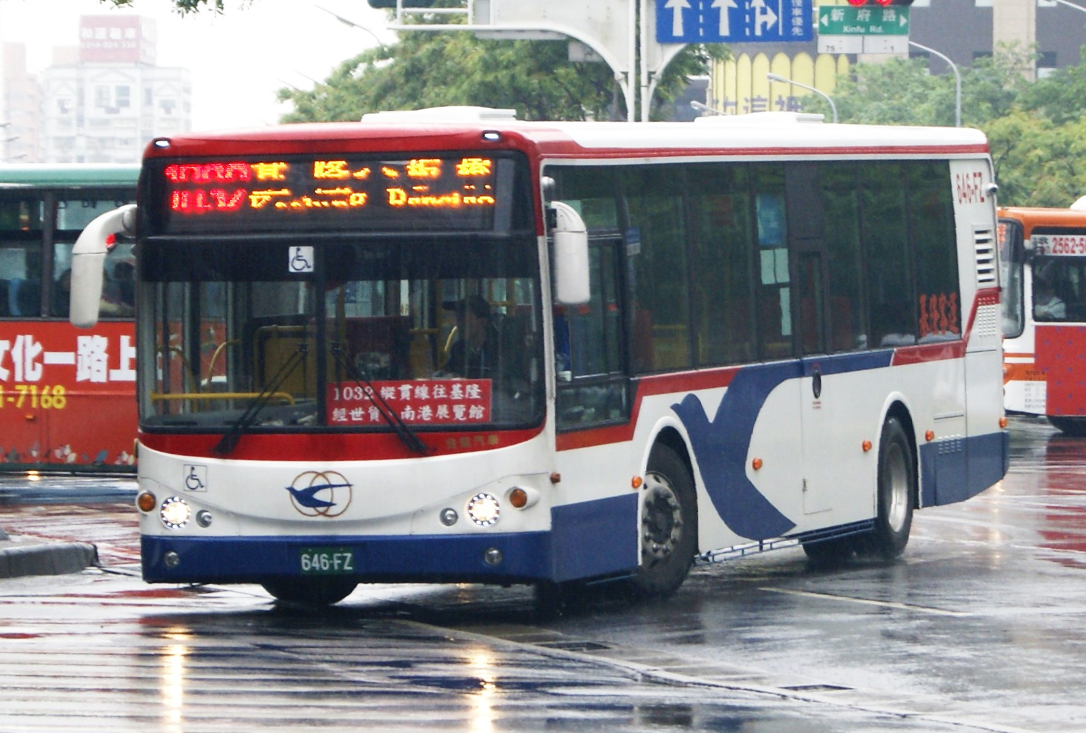 中文（台灣）: 基隆客運大客車646-FZ行駛1032線，雨中行經新北市板橋區新府路。